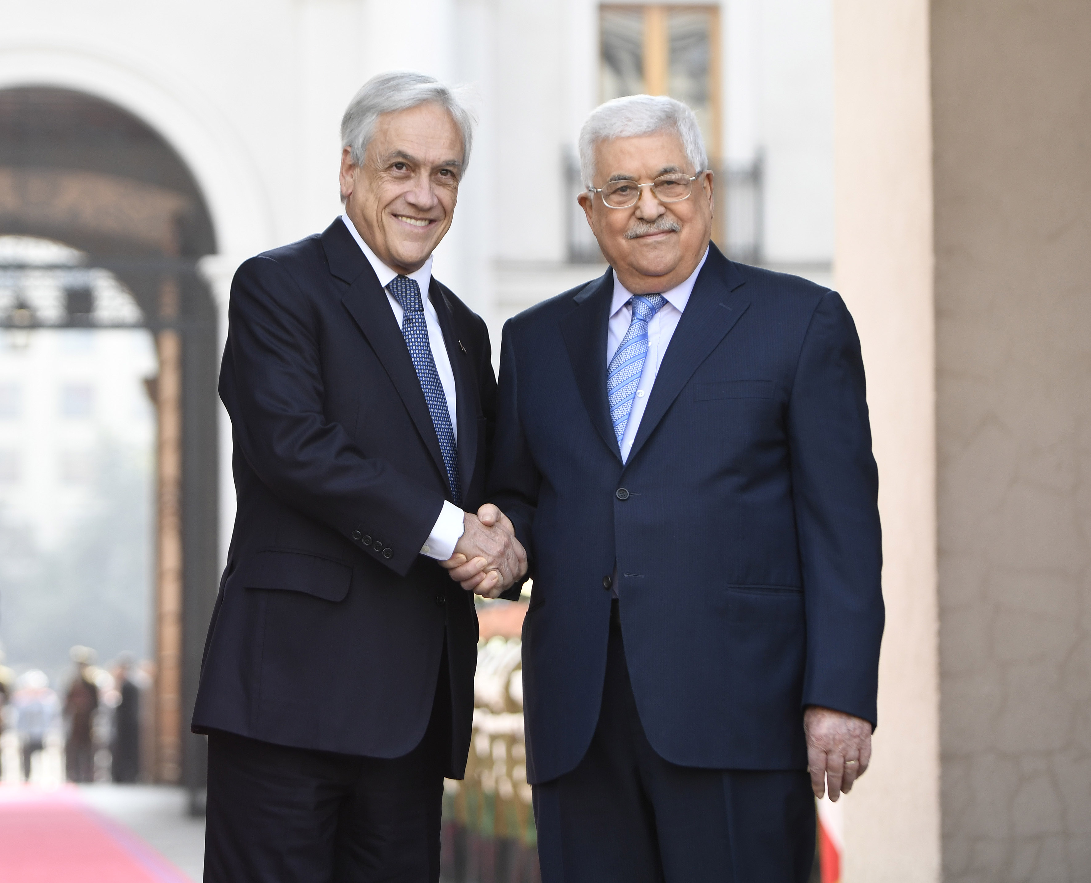 Presidente Piñera recibe en visita oficial a Presidente de Palestina, Mahmud Abás